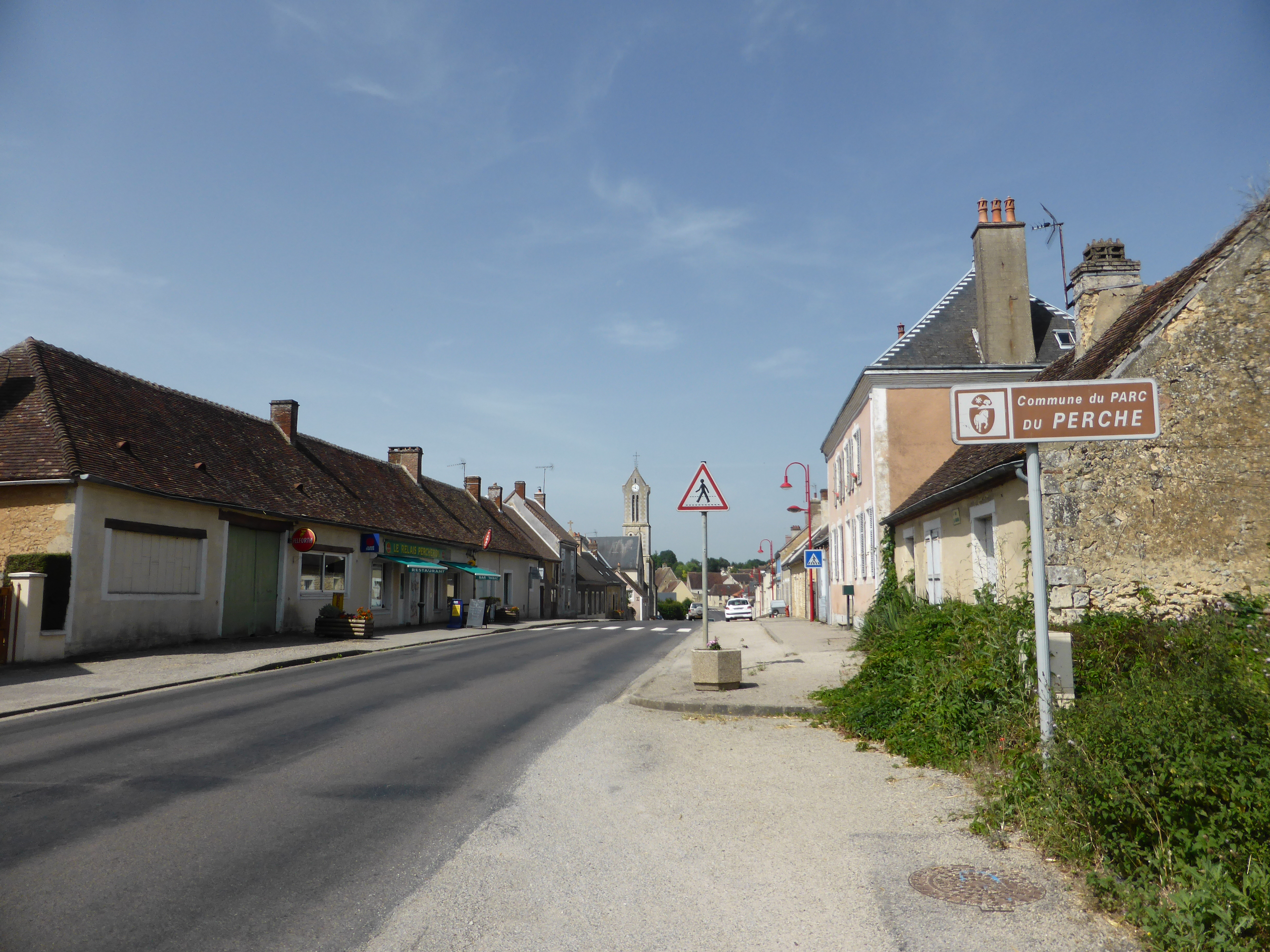 Village du Gué-de-la-Chaîne, dans l'Orne.